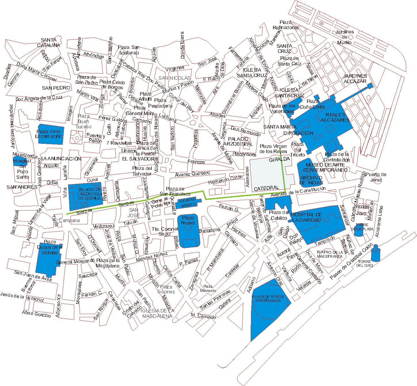 Trayecto que tiene que recorrer cada uno de los pasos que salen en la Semana Santa de Sevilla, la Carrera Oficial